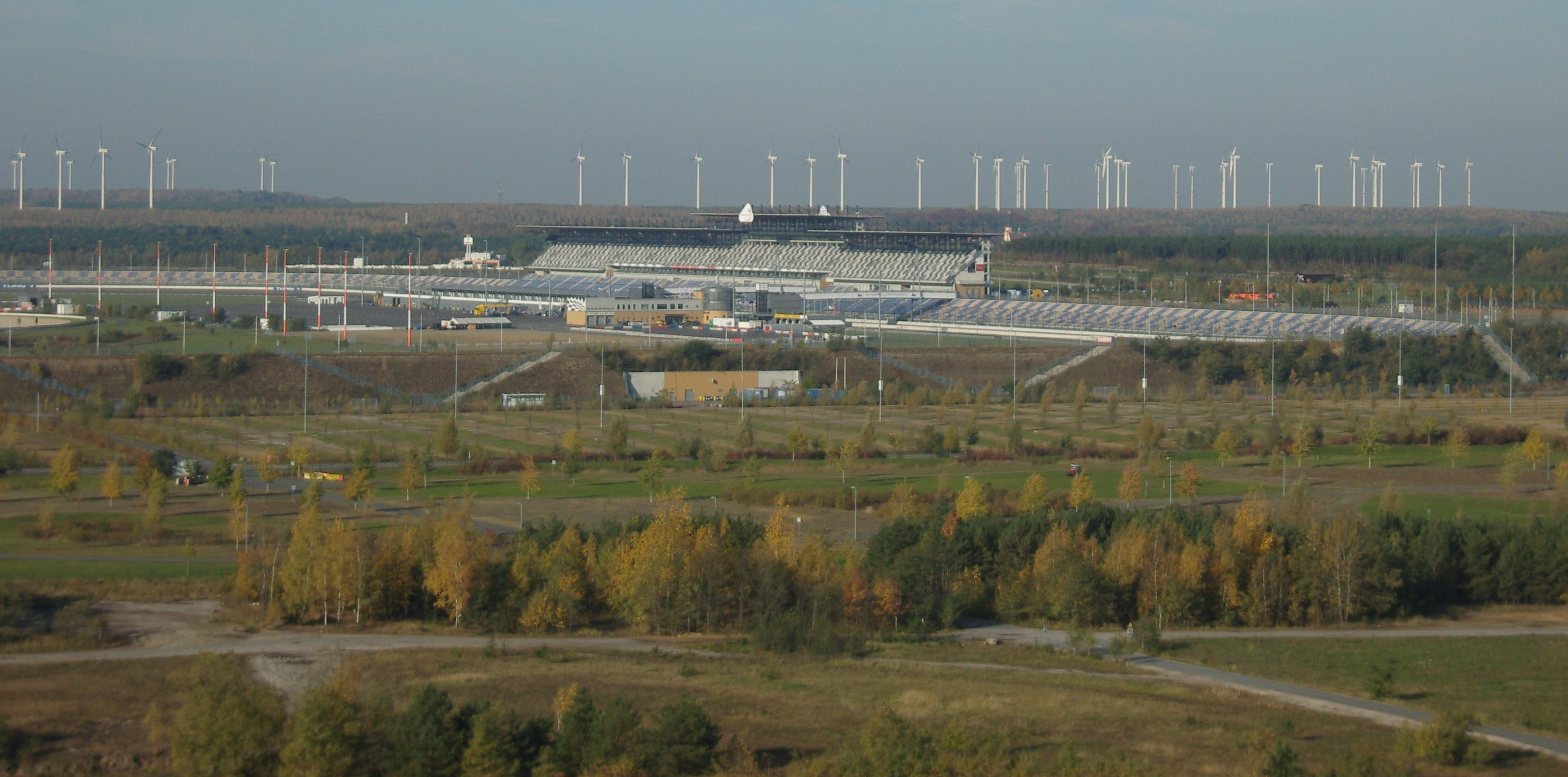 Eurospeedway Lausitz vom Aussichtsturm Hörlitz aus aufgenommen, im Hintergrund der Windpark Klettwitz